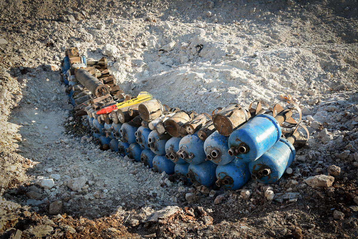 Работа сапёров Международного противоминного центра Министерства обороны России в Алеппо (Сирия)